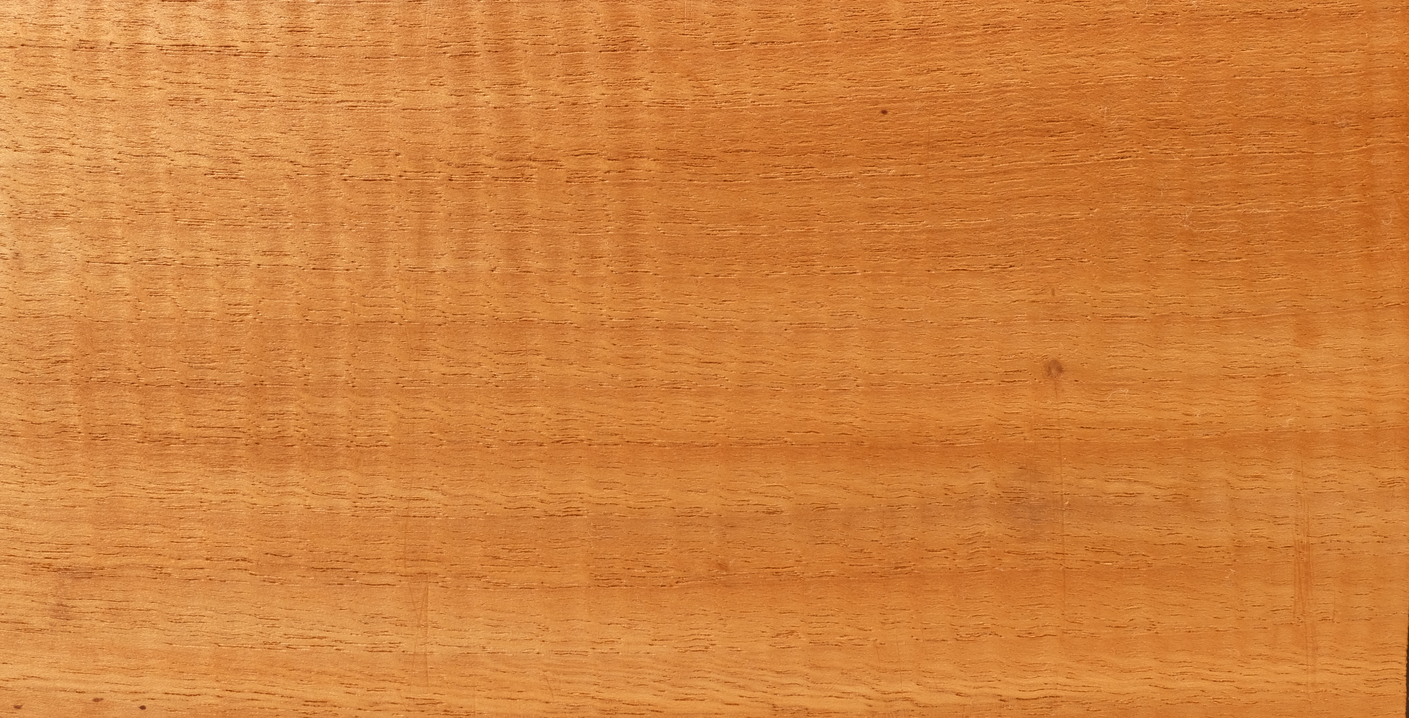 gemessertes Furnier; Holzart: EKE, Edelkastanie, Echte Kastanie, Esskastanie